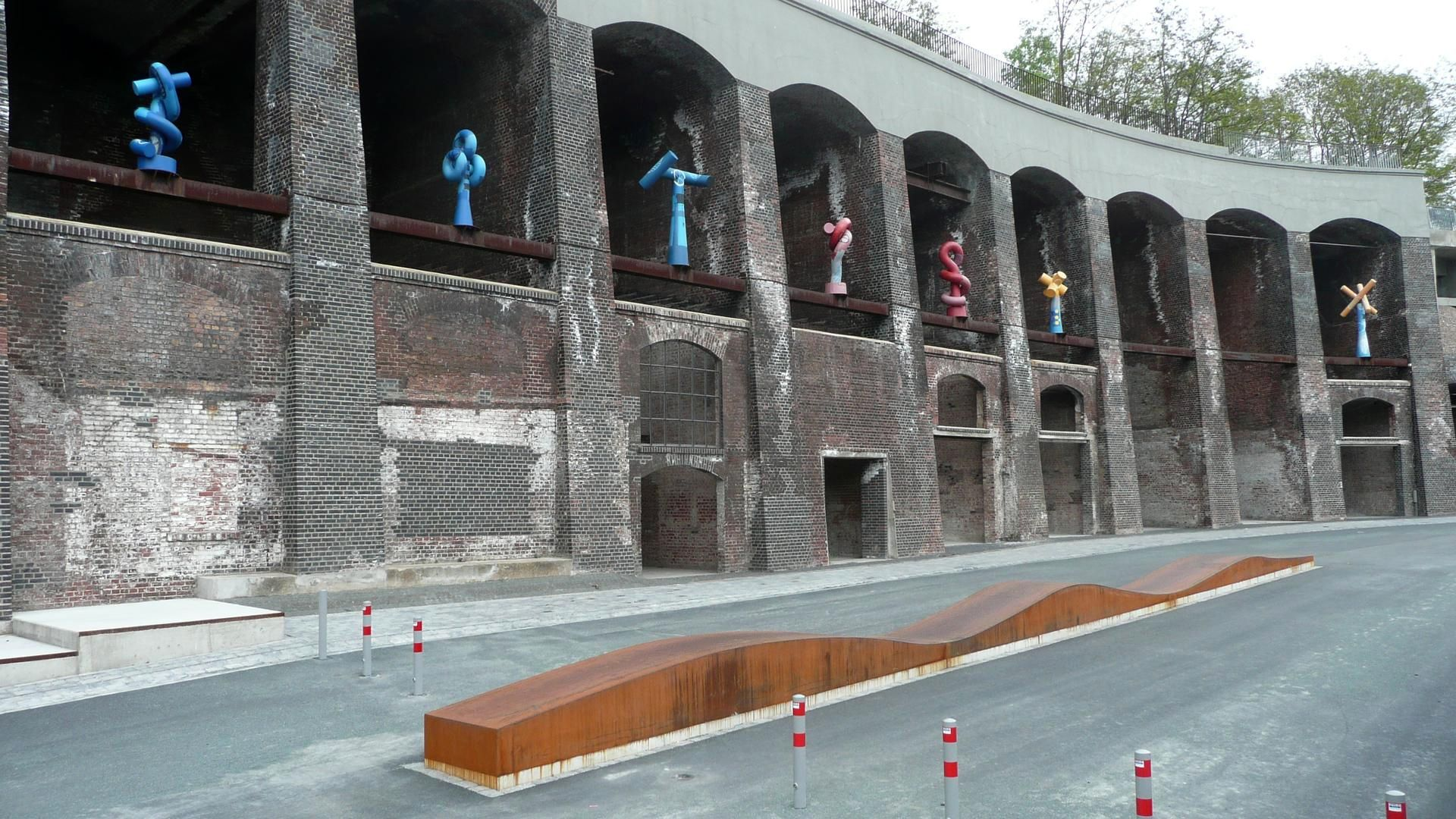 DIN 1511, Sieben Stahlstelen von Friedrich Gräsel im Colosseum Bochum, Alleestraße